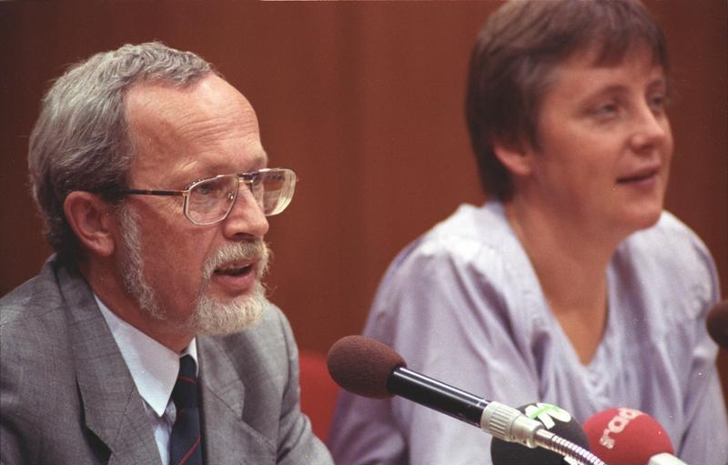 BER 17 / 3.8.90 / Berlin: De Maiziere für Oktober-Wahltermin DDR-Ministerpräsident Lothar de Maiziere (CDU/links) hat sich für gesamtdeutsche Wahlen bereits am 14. Oktober 1990 ausgesprochen. Am selben Tag finden in der DDR die Landtagswahlen statt. De Maiziere nannte den Termin auf einer Pressekonferenz in Ost-Berlin. Nach den bisherigen Planungen sollte das gesamtdeutsche Parlament am 2. Dezember 1990 gewählt werden. [rechts Angela Merkel] ADN/Settnik